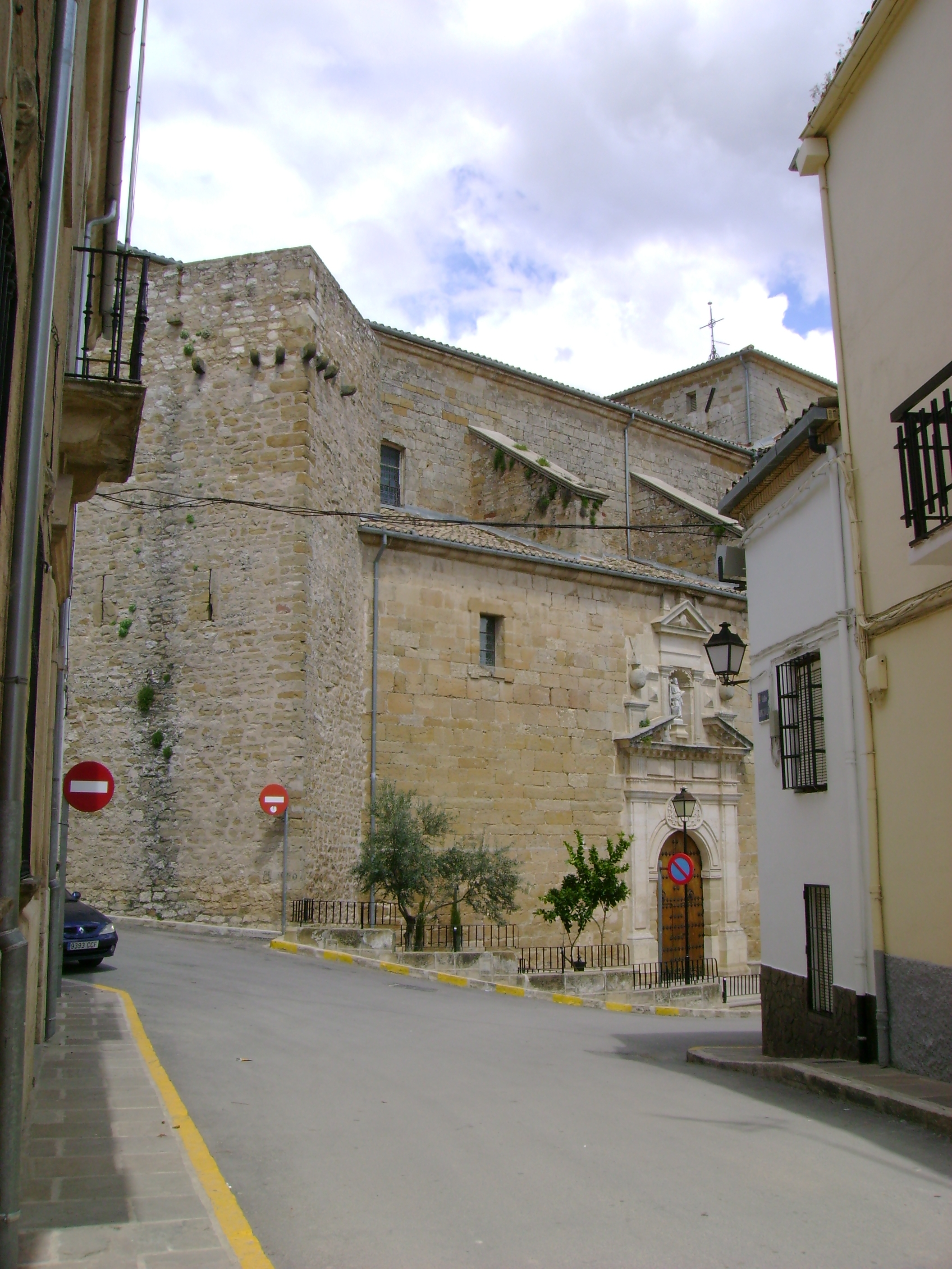 Iglesia de San Andrés en Villanueva del Arzobispo.